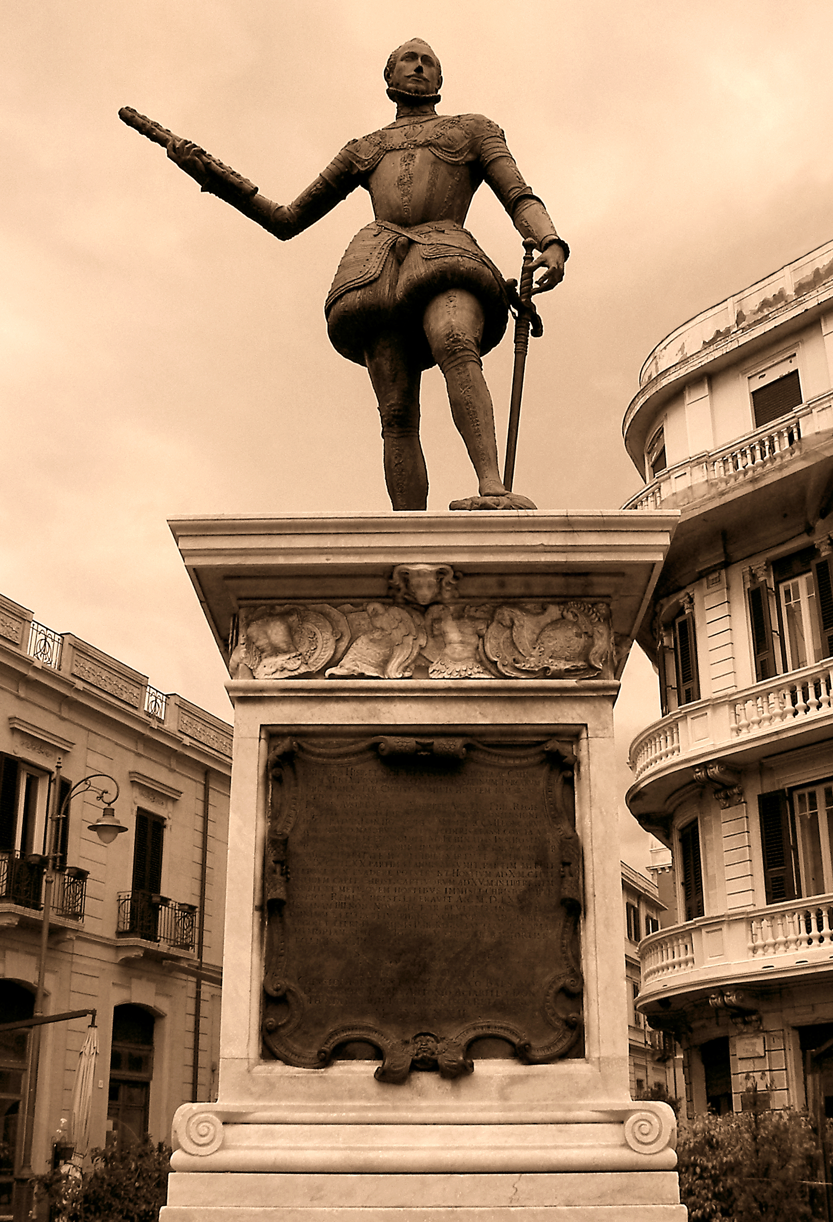 La statua di Don Giovanni d'Austria situata nella piazza dei Catalani